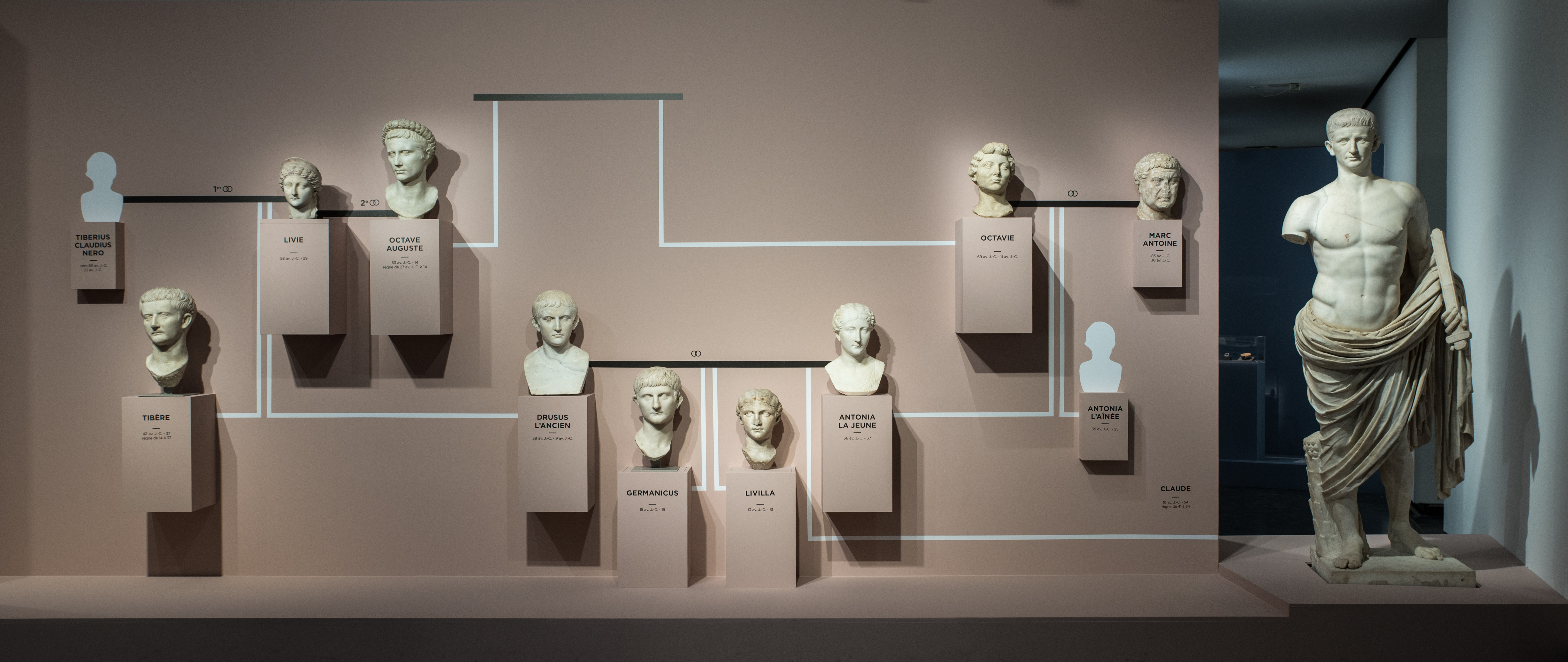 Arbre genealogique de la dynastie des Julio-Claudiens